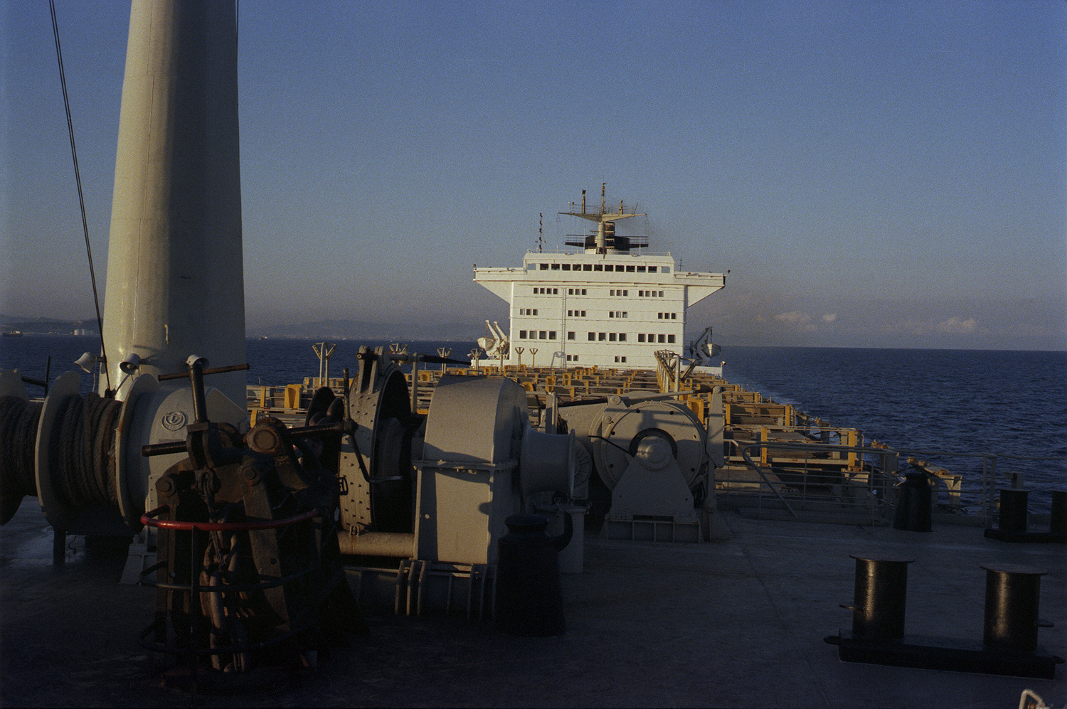 Blick über das Deck der Alemania Express 1980 während einer Ostasien-Reise